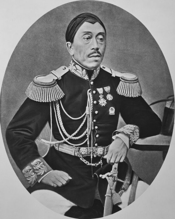 Foto. Waarschijnlijk foto naar geschilderd portret. Zijne Hoogheid Pangeran Adipati Ario Mangkoe Negoro IV (1853-1881)